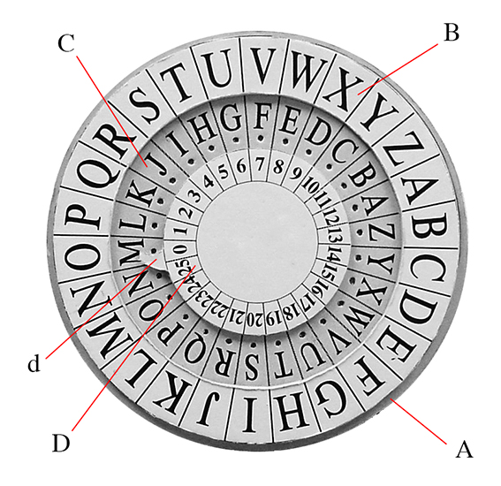 Model urządzenia szyfrującego opracowanego przez Franka S. Baldwina w 1877 roku